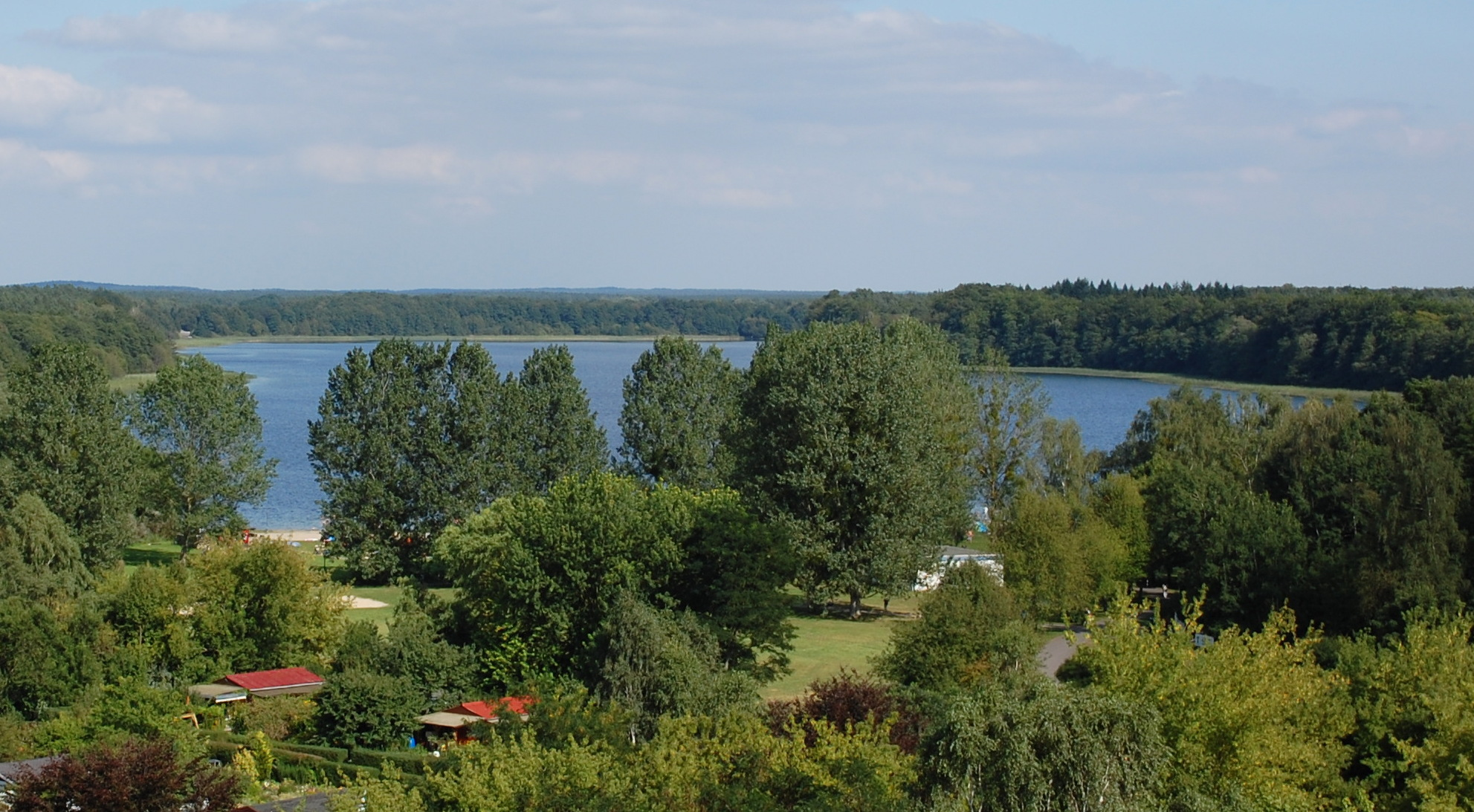 Blick auf den Lübbesee vom Seehotel Templin